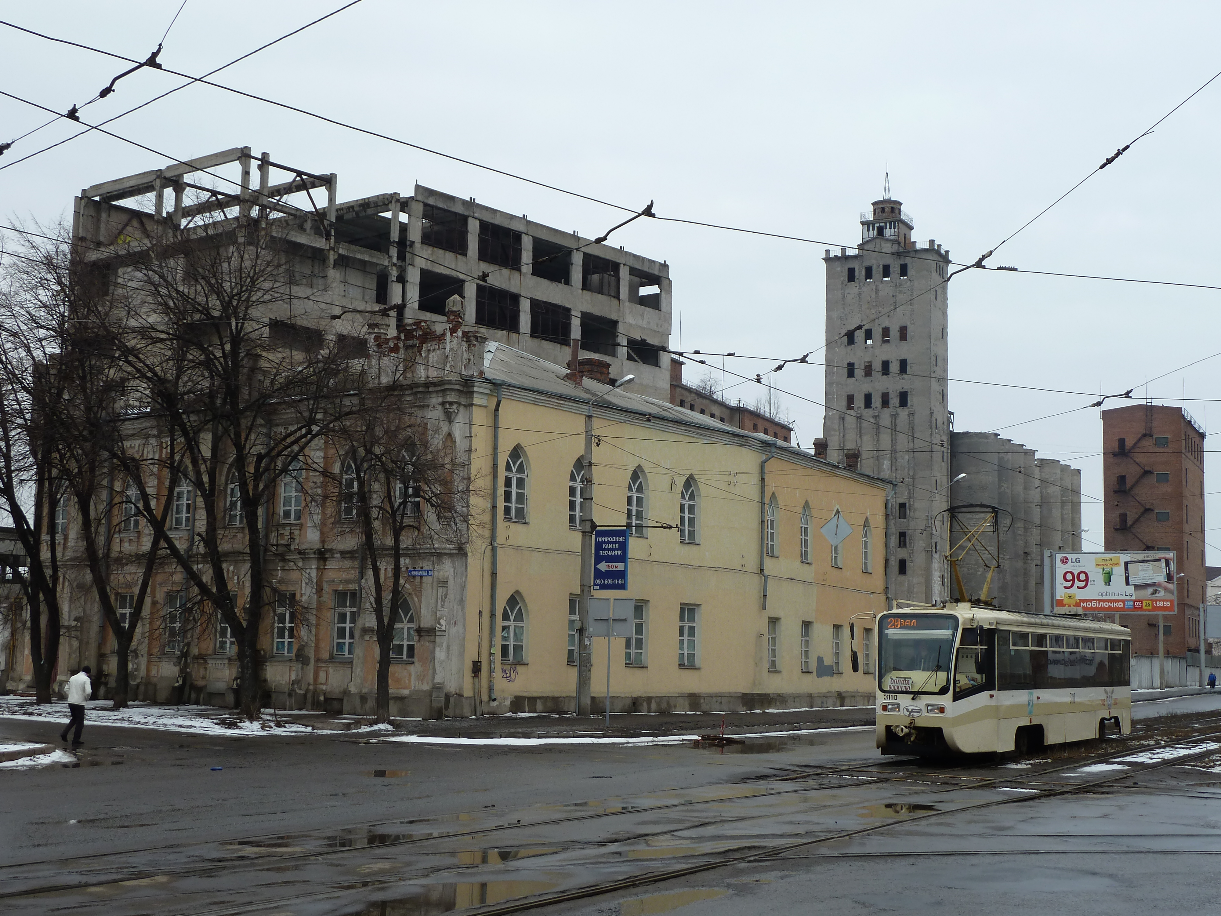 Красноармейская улица в Харькове